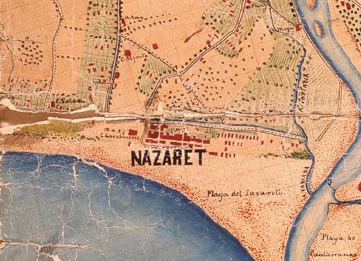 Natzaret el 1883 (el nord està a la dreta).